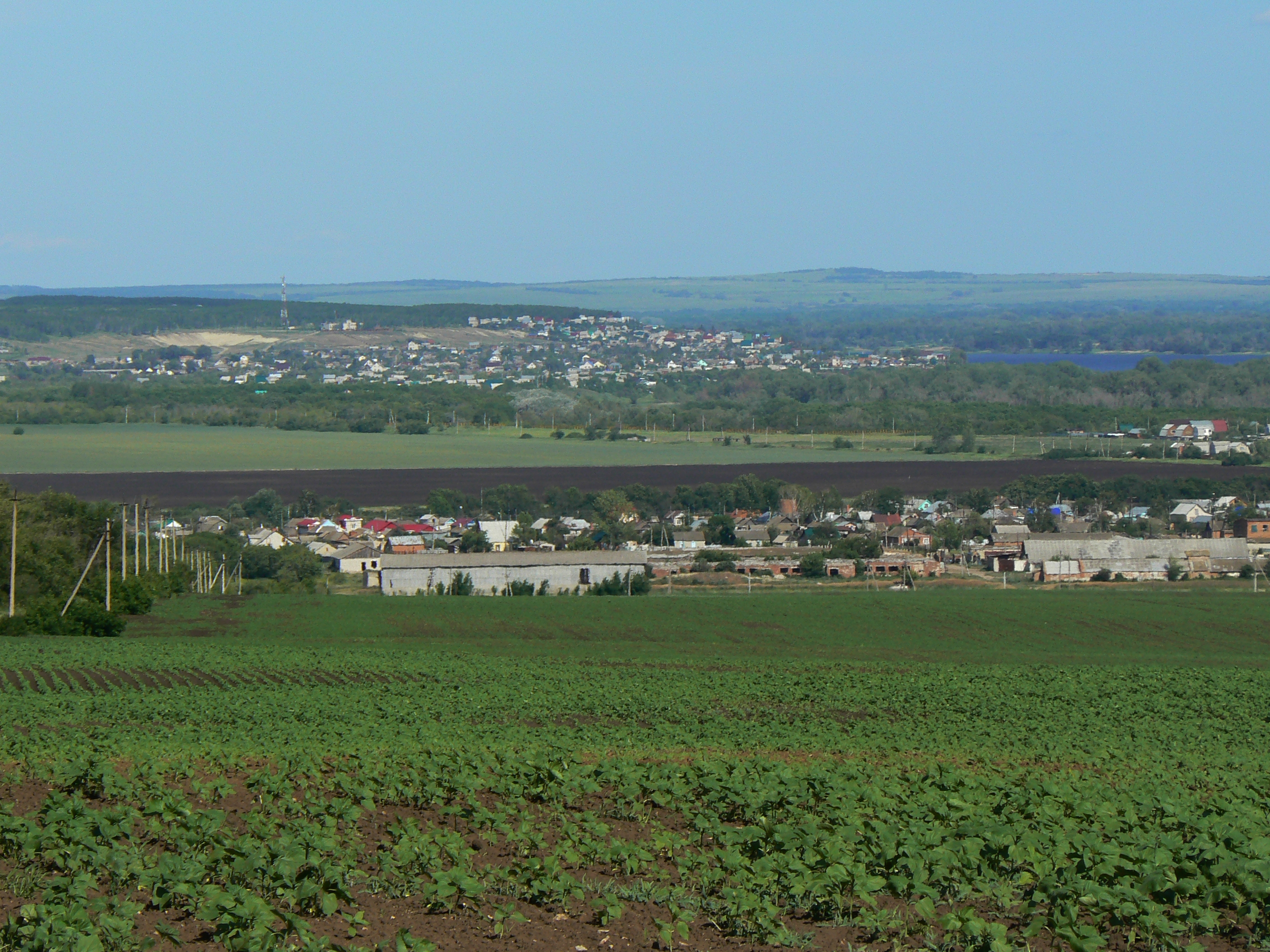 Вид на с. Елшанка и с.Усовка с поля